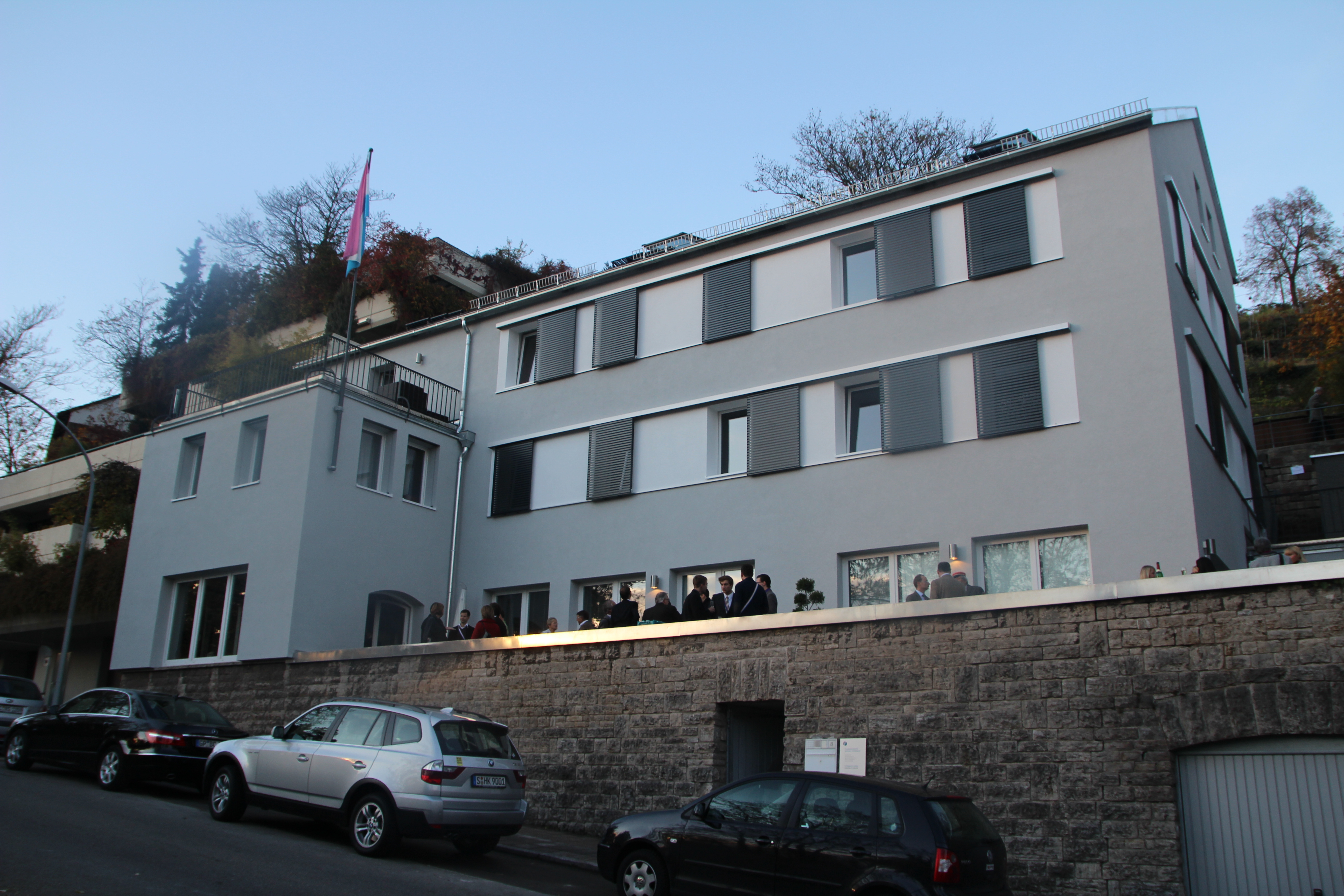 Corpshaus Rhenania Stuttgart 2011